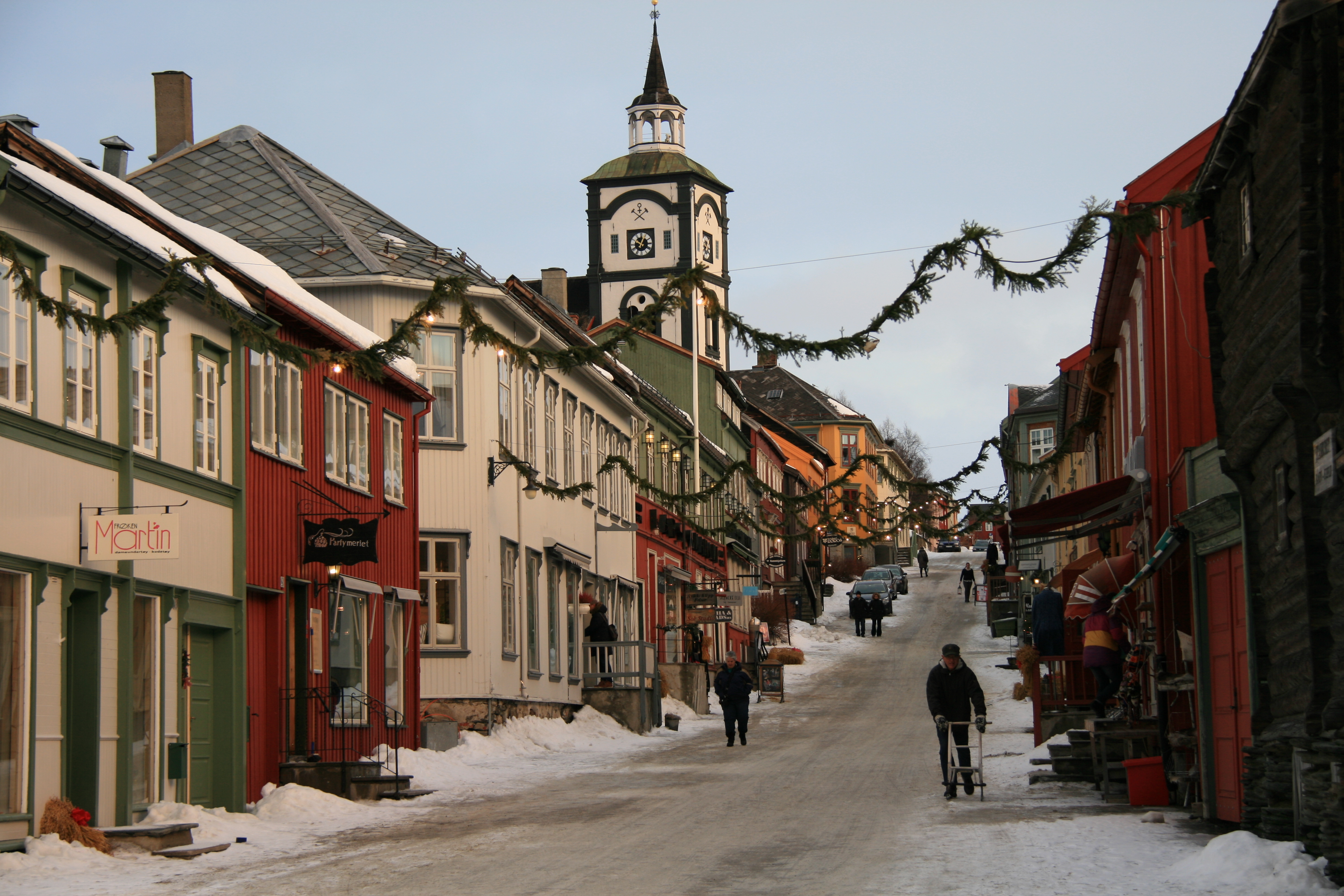 Bergstaden står på UNESCOs verdernsarvliste